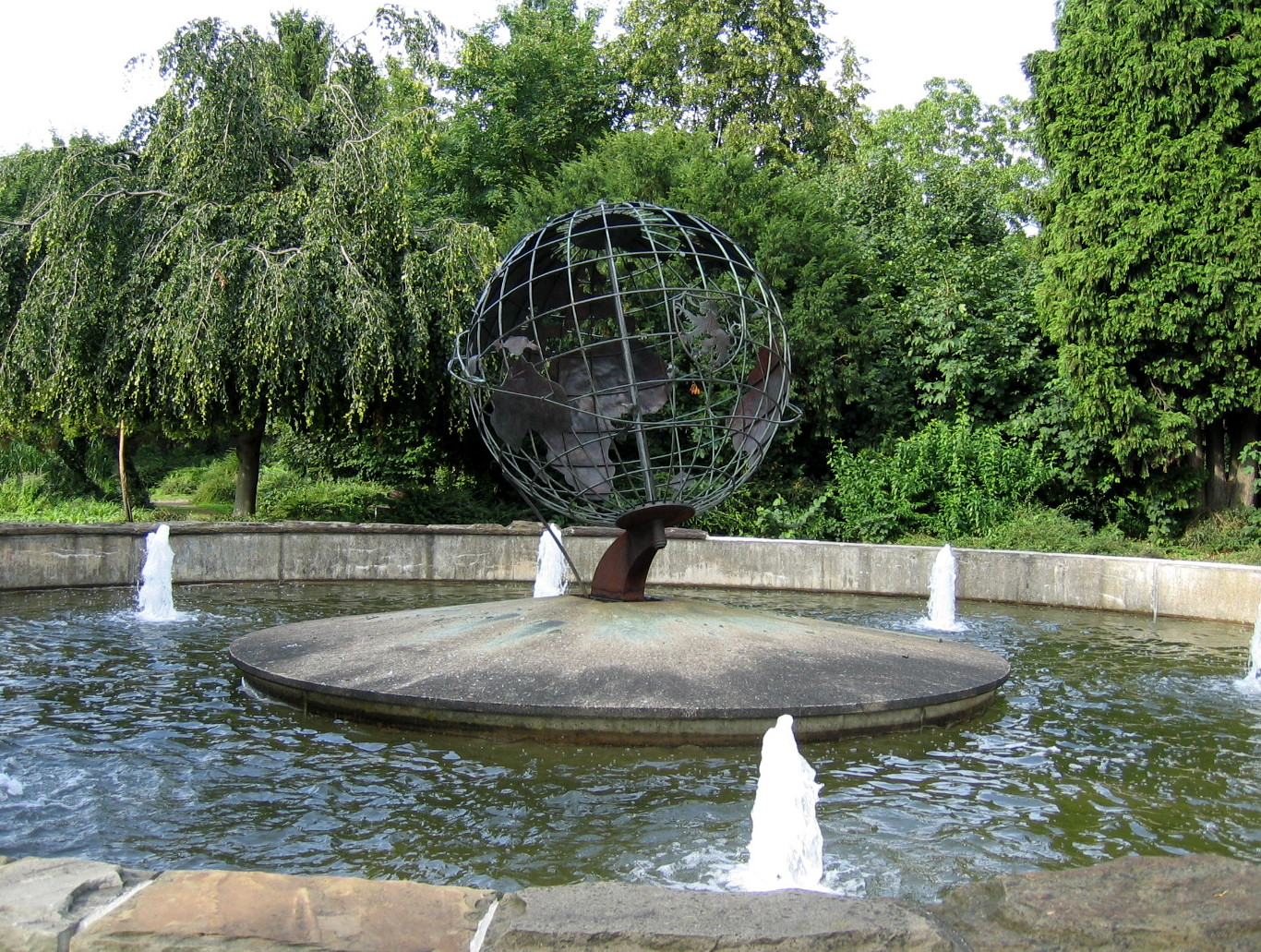 Brunnen (Weltkugel) am Ehrenmal in Hagen-Hohenlimburg-Elsey.